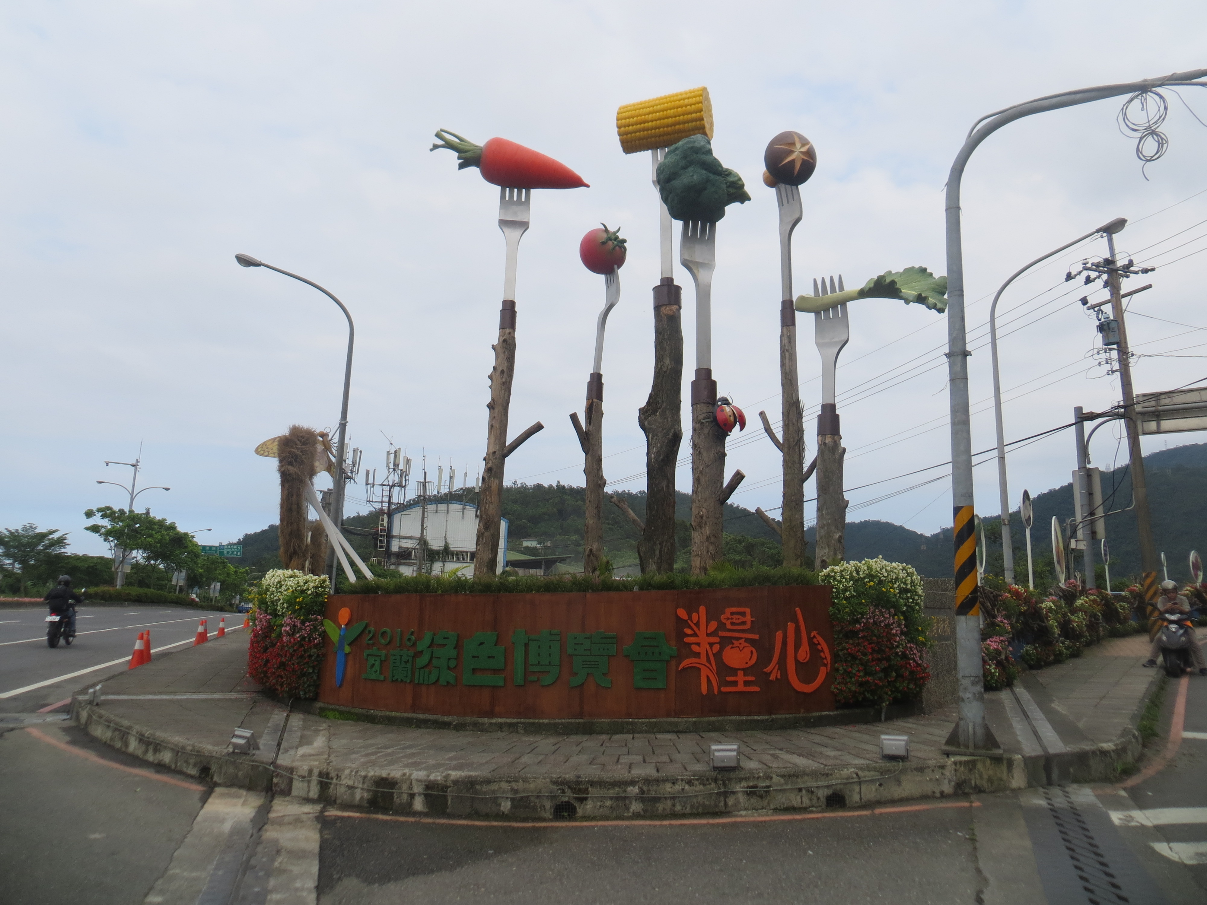 2016年宜蘭綠色博覽會，主題「糧心」，於台9線、武荖坑路口設立結合蔬果、仰天叉子的意象雕塑。左為台9線，過新城溪後前往蘇澳；右為武荖坑路，通往武荖坑景區──綠博會場。5月12日